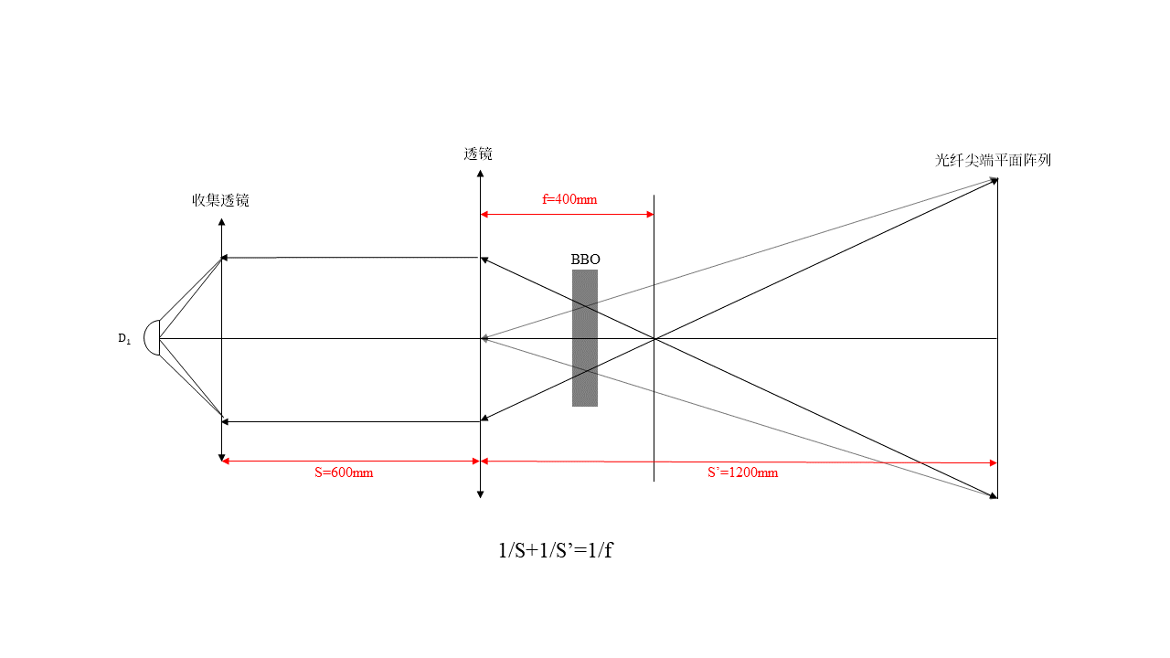 史砚华小组量子成像装置沿光路的展开图。可参见File:量子成像示意图.png